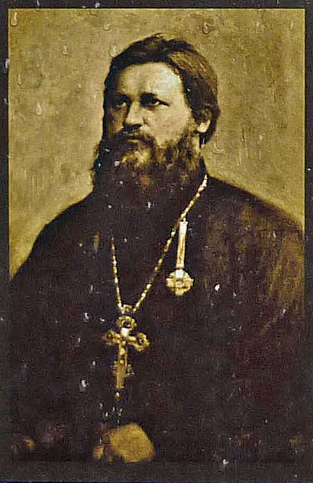 Alexei Petrowitsch Malzew (1854-1915), Erzpriester und Vorsteher der russischen Botschaftskirche in Berlin